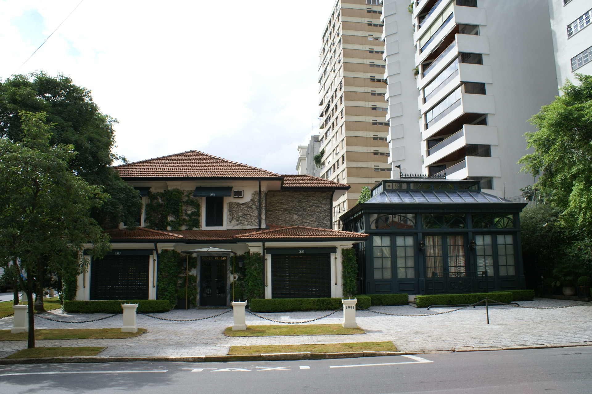 Antiquário Renné Behar nos Jardins, São Paulo, Brasil - Antiquarian Renné Behar in Jardins neighborhood, São Paulo City, Brazil.